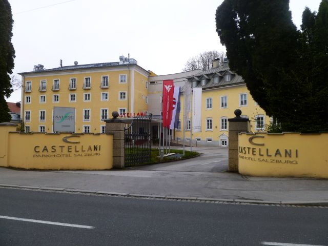 Kasererhof - Hotel Castellani